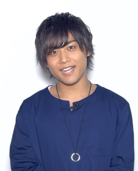 河本啓佑（声優）